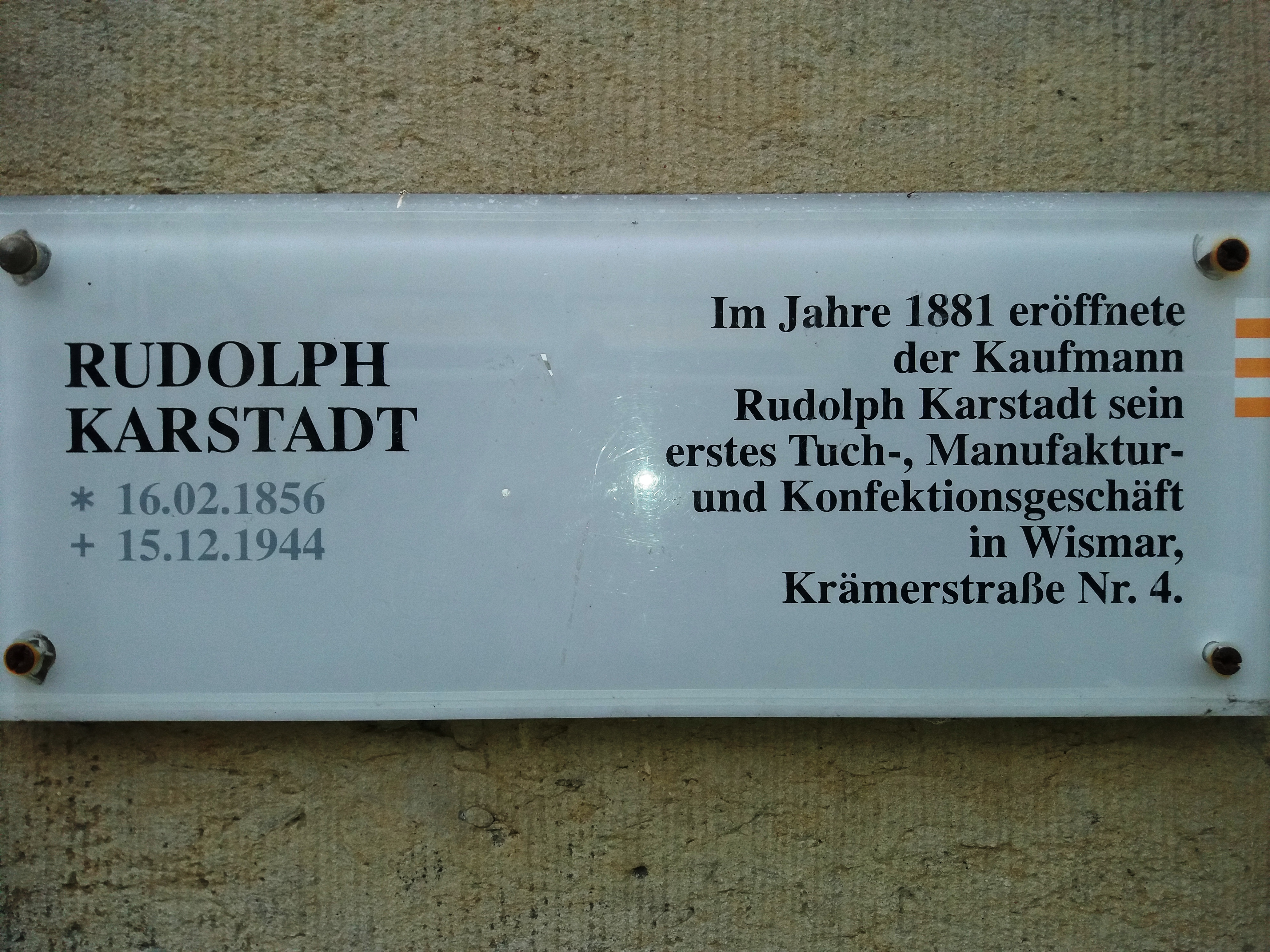 Tafel an der Karstadtfiliale in Wismar